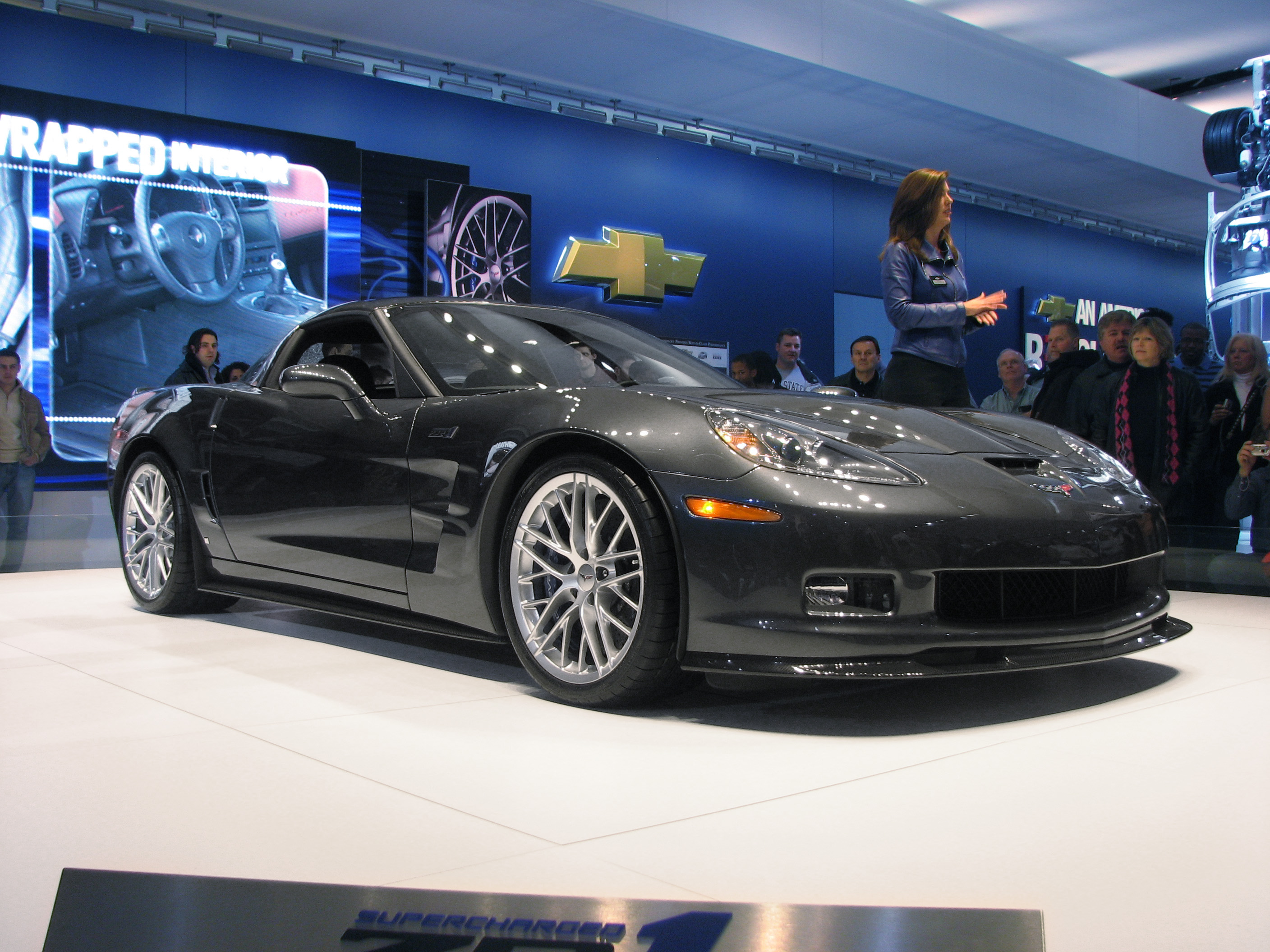 Corvette ZR1 at 08 NAIAS